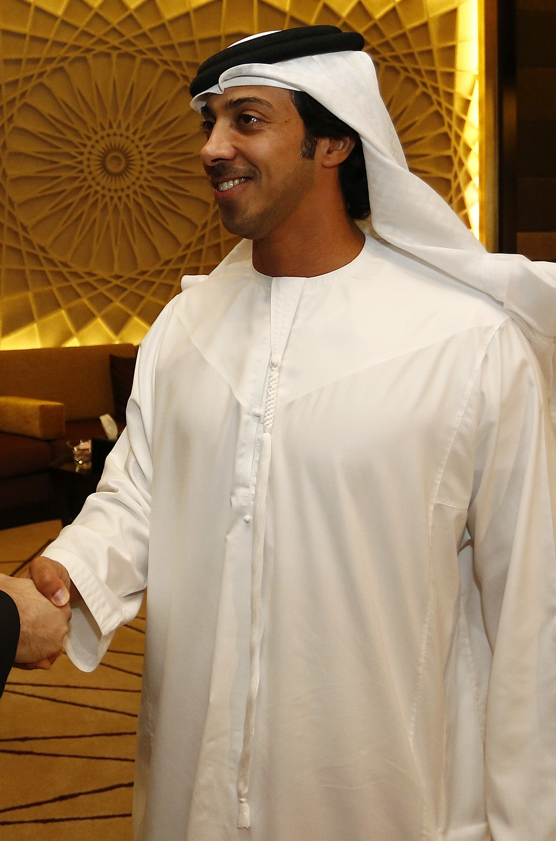 Arbeitsbesuch Vereinigte Arabische Emirate. Vizekanzler Michael Spindelegger trifft Minister Sheikh Mansour bin Zayed Al Nahyan. Abu Dhabi, 13.02.2013, Foto: Dragan Tatic